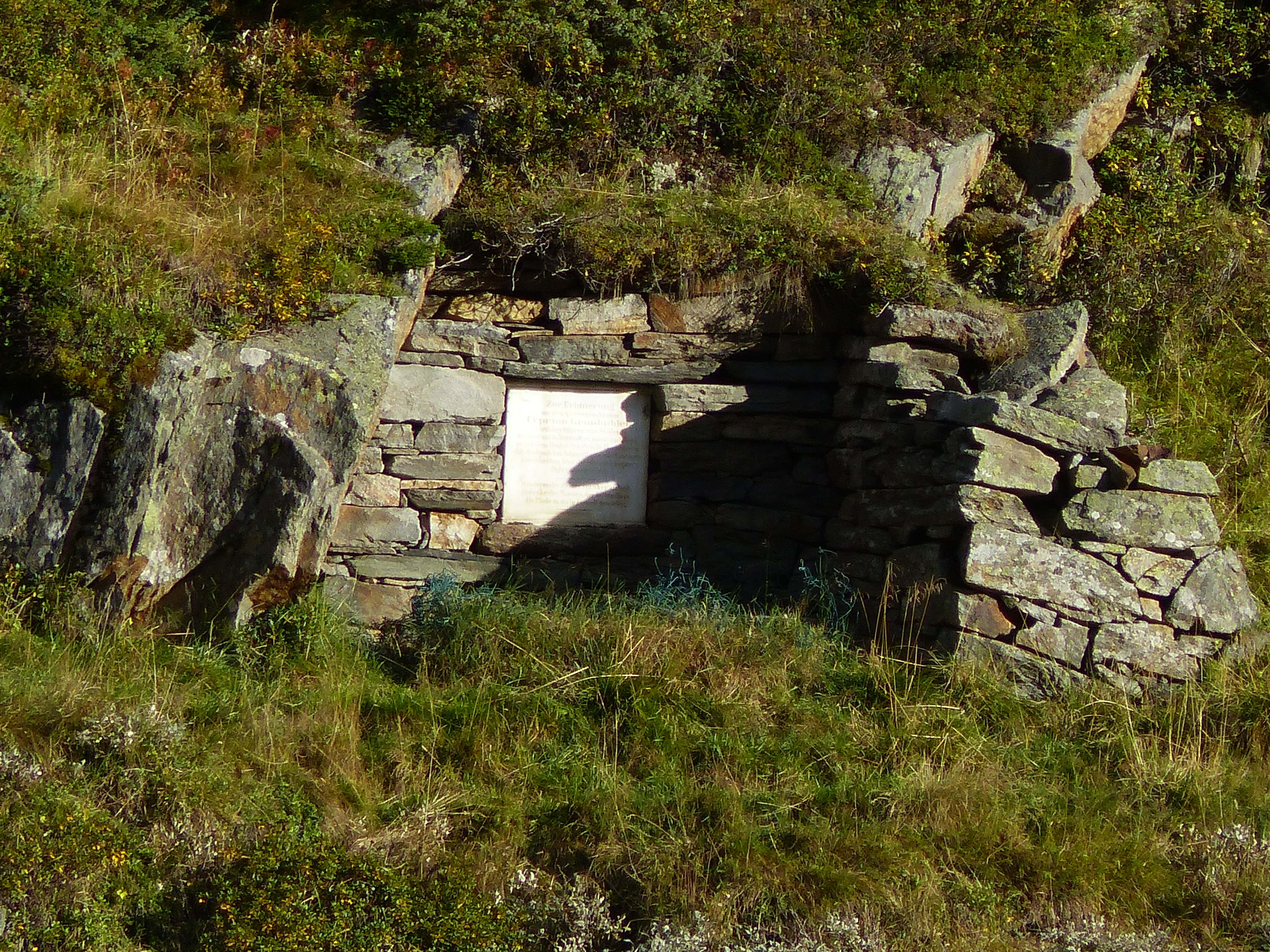 1869 errichtetes Denkmal für Cyprian Granbichler am Sterbeort. Inschrift: "Zur Erinnerung an den ehrengeachteten Cyprian Granbichler, Gletscherführer aus Sölden, welcher am 8. November 1868, nachdem er mit dem Hochw. Curaten Hr. Franz Senn das Hochjoch bei Schneesturm und Lawinen überschritten, hier der übermäßigen Anstrengung erlag - Wanderer, der Du hier vorüber ziehest Wanderer, gedenke des Mannes, der so Manchem die Pfade dieser Eiswelt gewiesen."